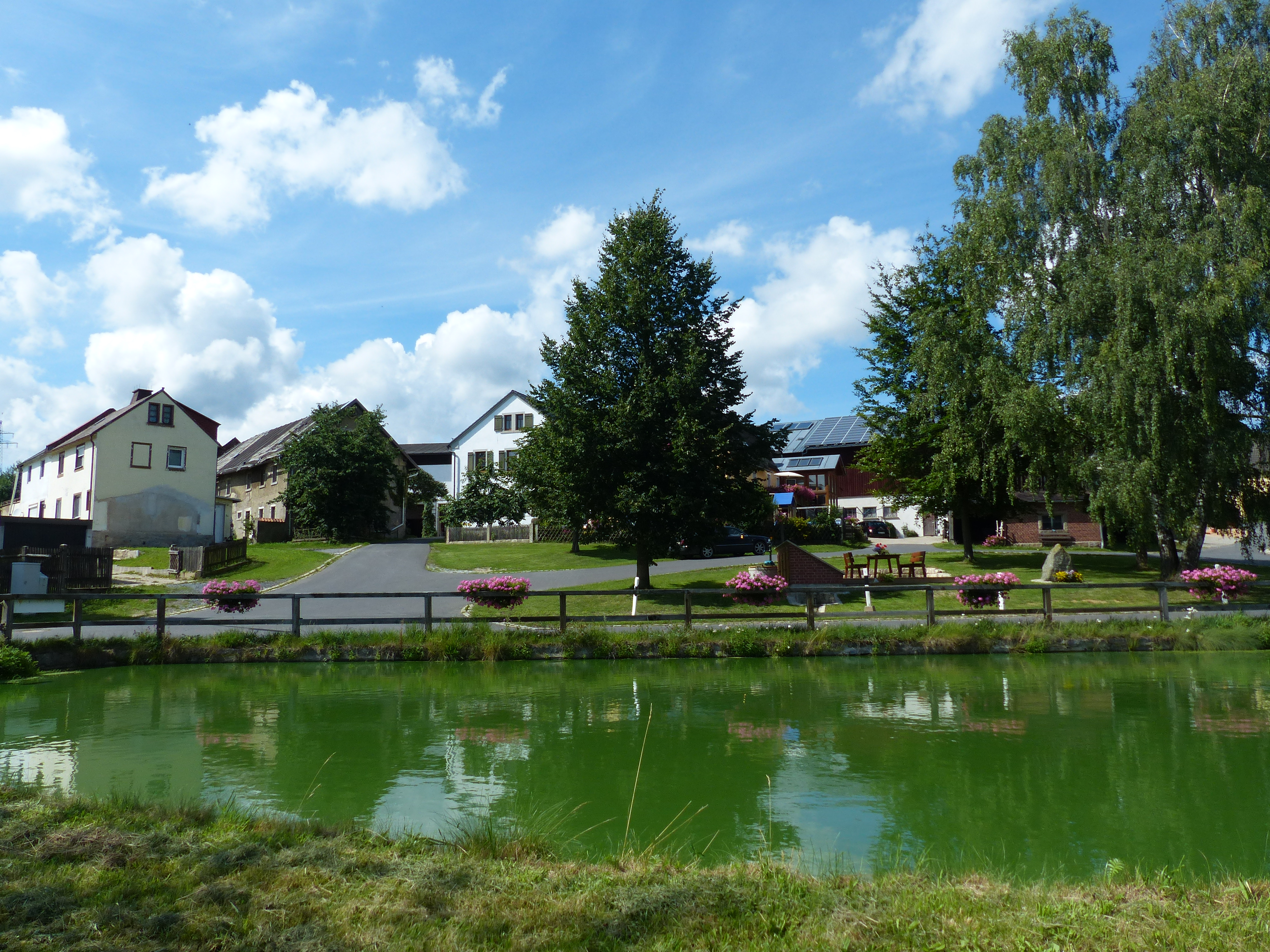 Ortsmitte von Hohenbuch, Ortsteil von Kirchenlamitz